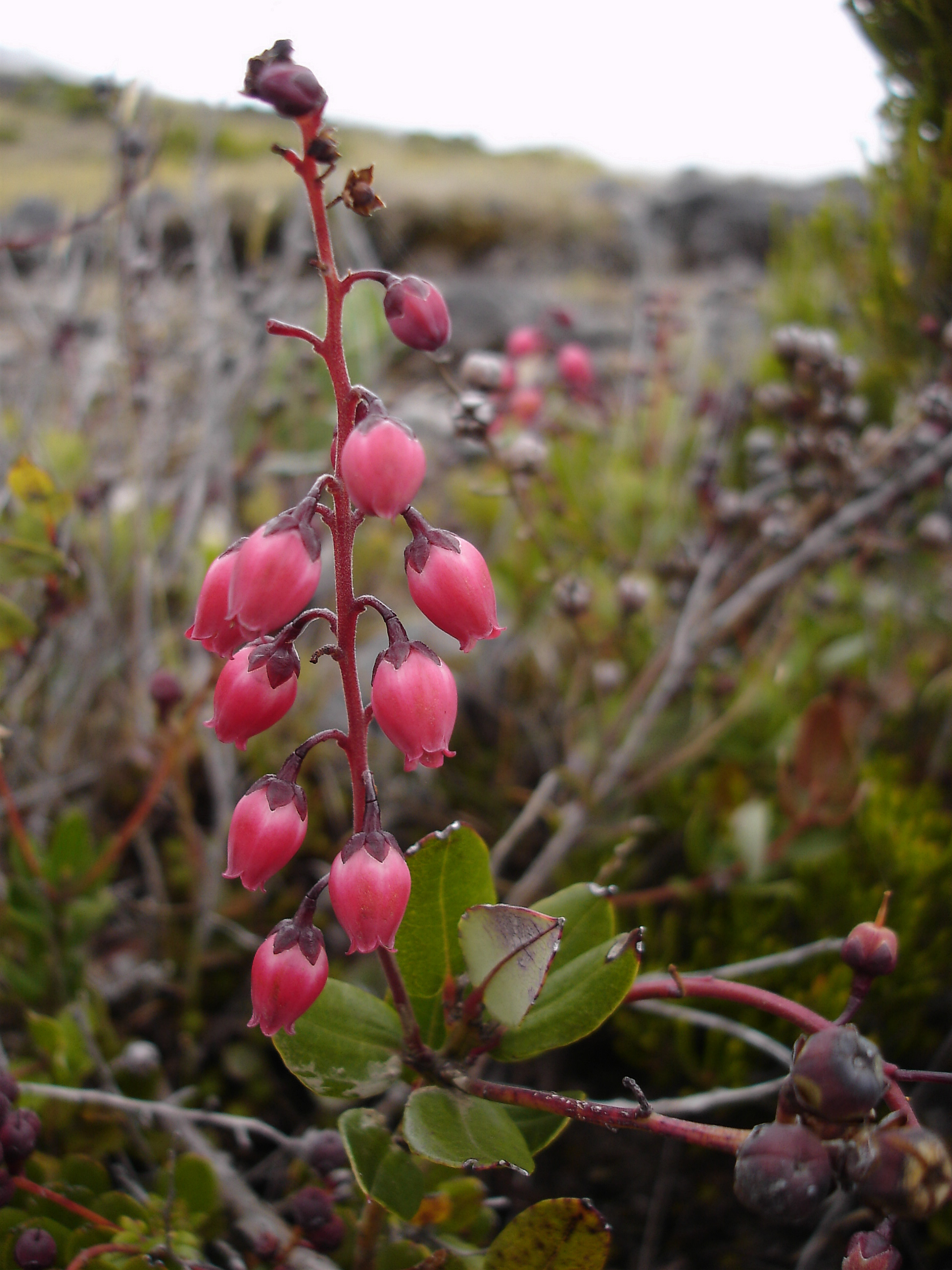 Description: Agauria buxifolia, november 2004, La Réunion (Petit bois de rempart - Endémique de La Réunion - Ericacées) - Réserve naturelle de la Roche EcriteSource: Bouba